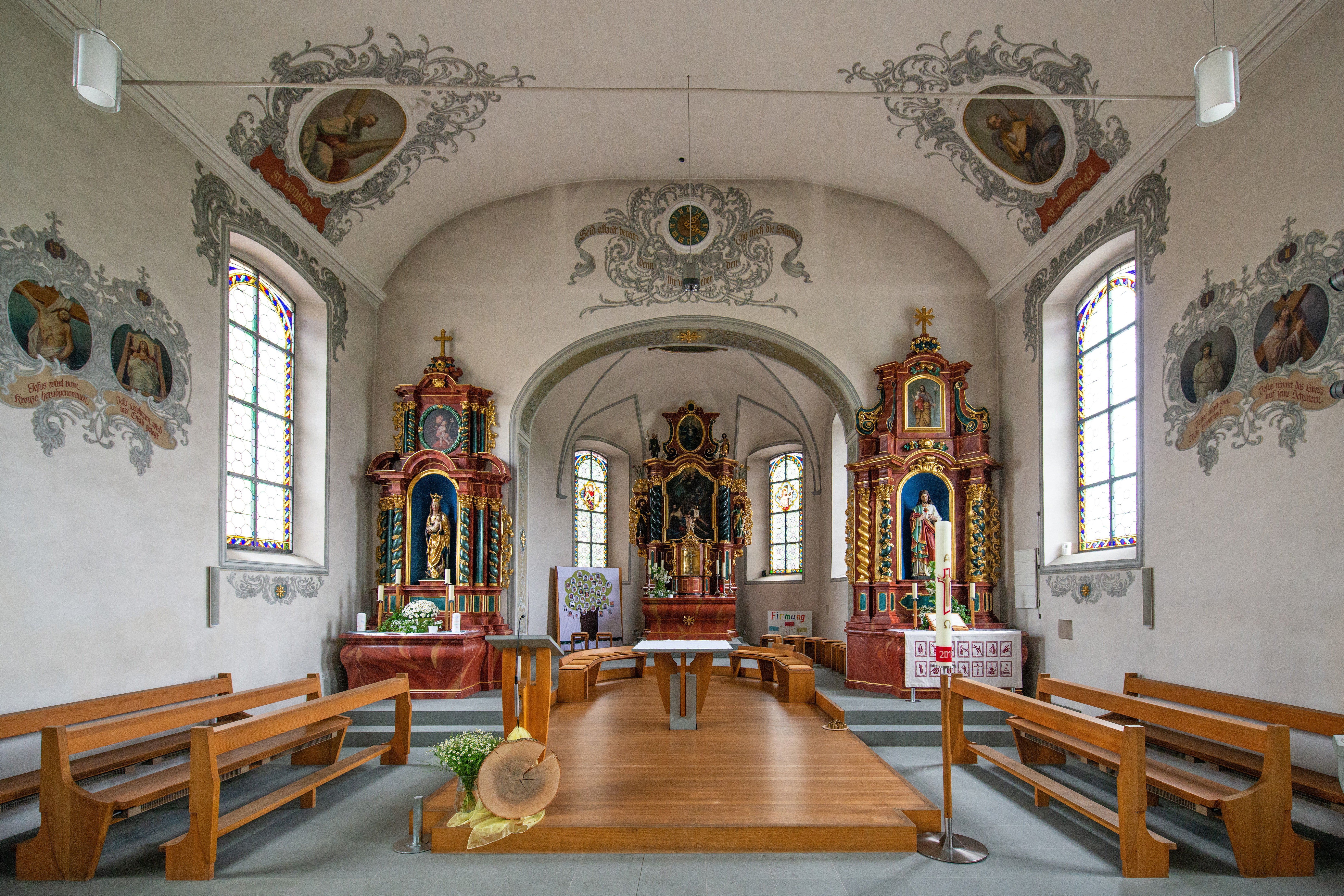 Pfarrkirche "Hl. Batholomäus" in Mäder.